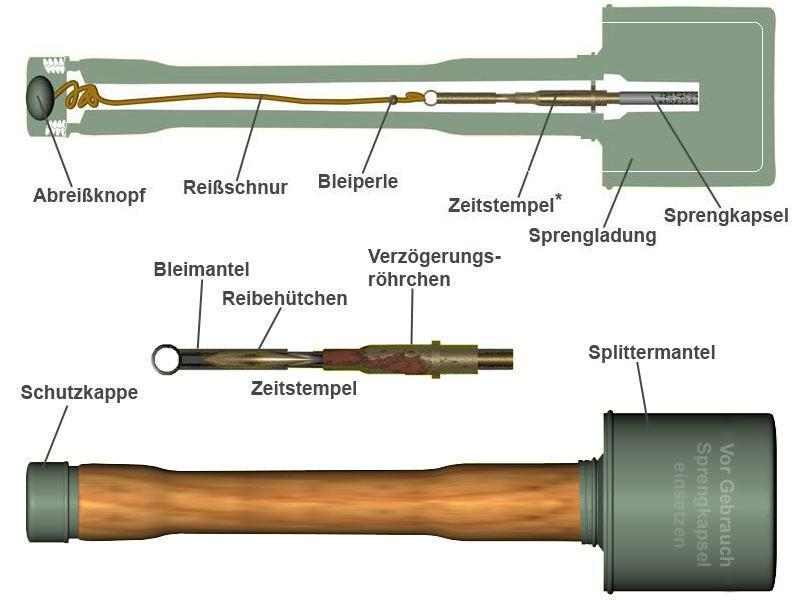 Stielhandgranate 24, Aufbau einer Handgranate Sonstiges: stilisierte Darstellung, selbst erstellt